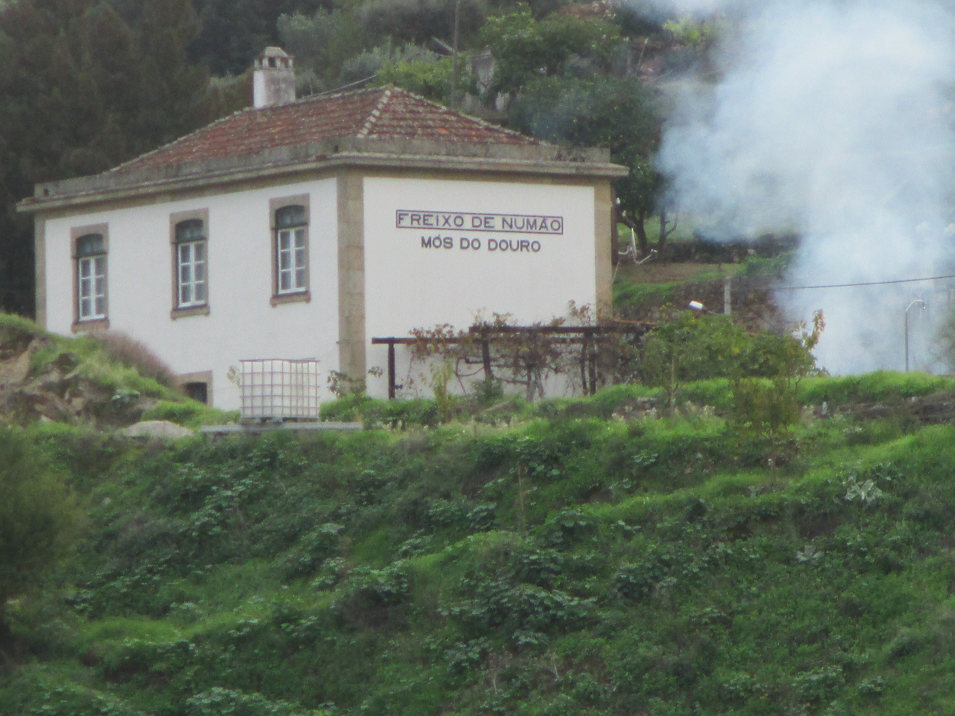 MV Douro Prince. From Barca d'Alva to Lamego. portugal douro riodouro riverdouro 2014 mvdouroprince